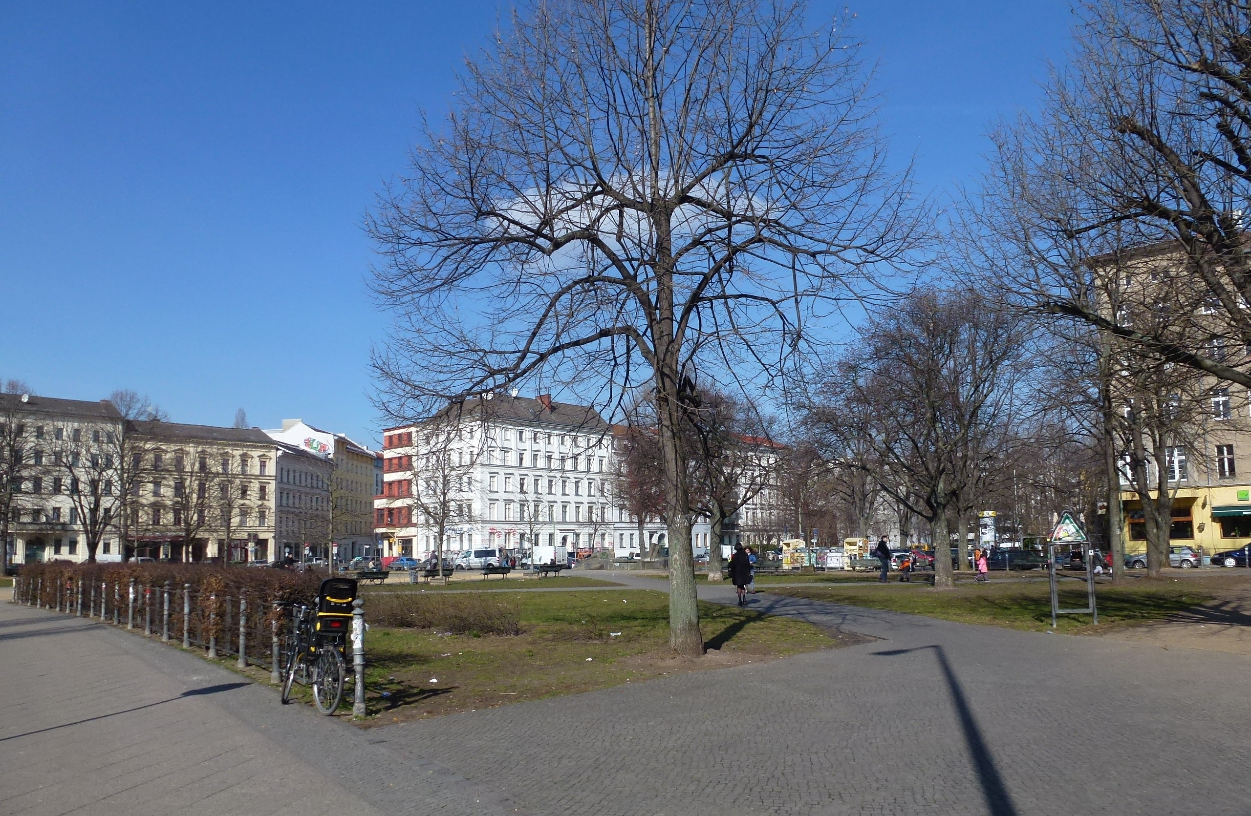 Berlin-Kreuzberg Oranienplatz